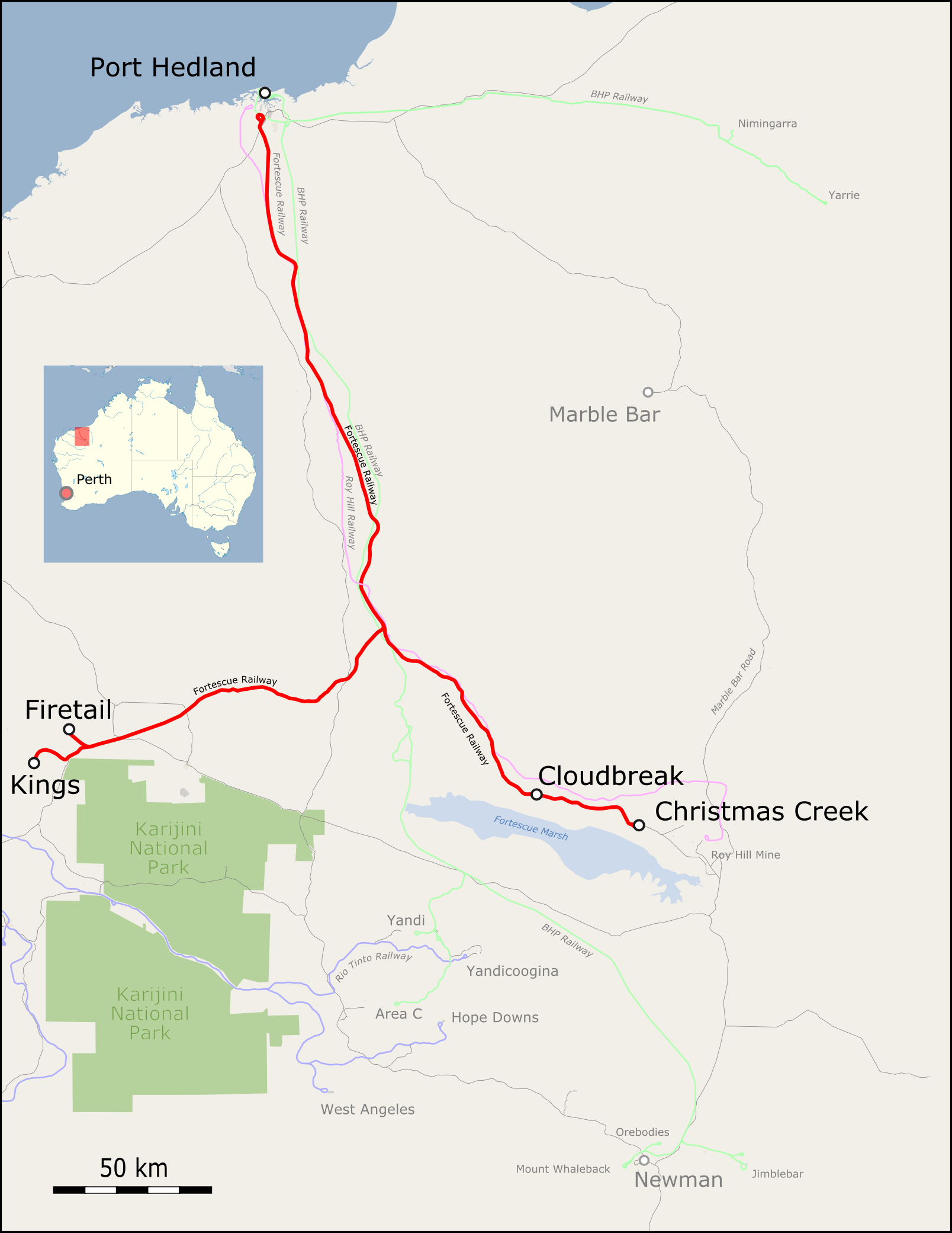 Karte der Fortescue Railway in Australien